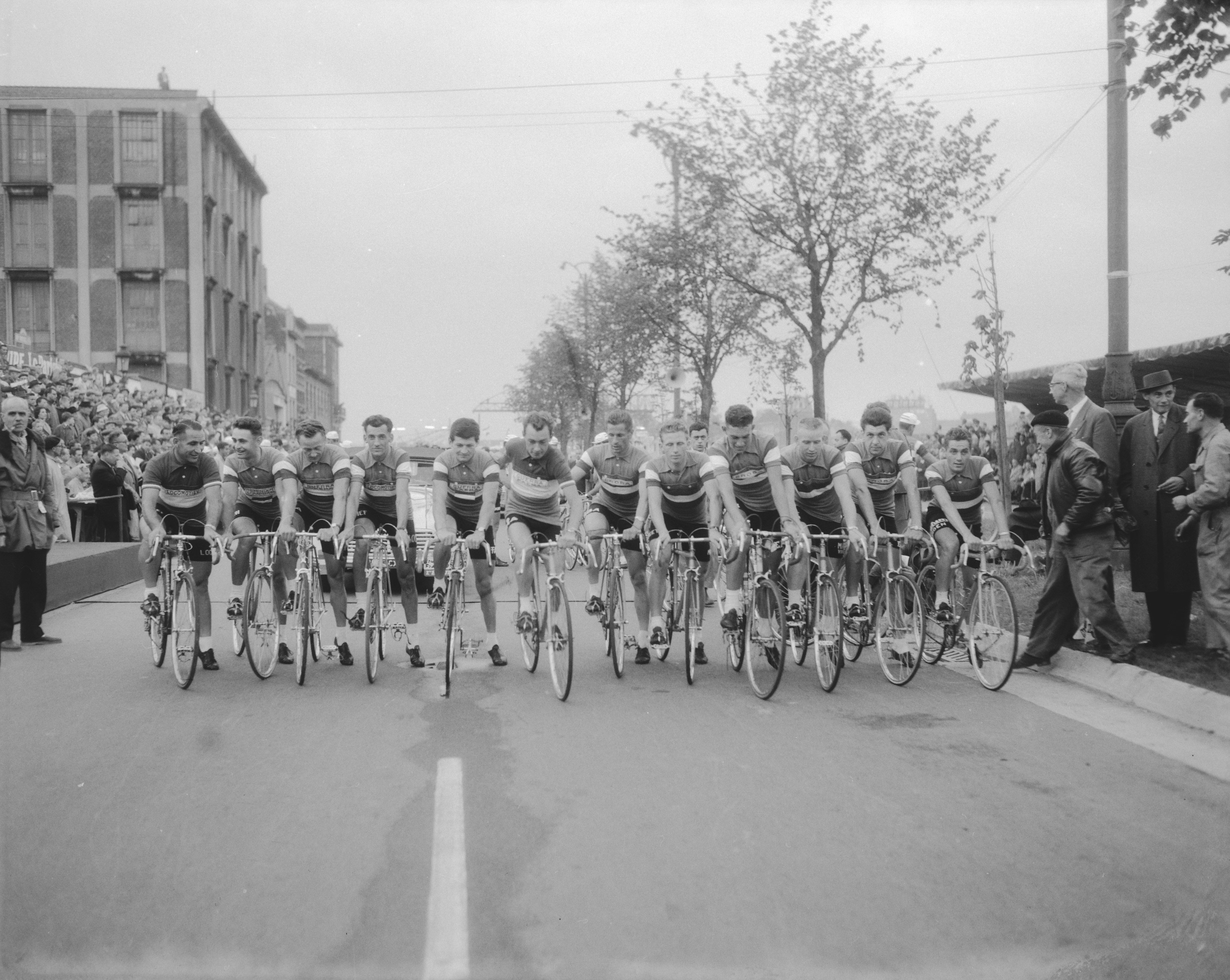 Collectie / Archief : Fotocollectie Anefo Reportage / Serie : [ onbekend ] Beschrijving : Tour de France ploeg stelt zich voor in Brussel Tour de France stelt zich voor in Brussel. De ploeg bestond uit 12 renners. Daarvan 8 Nederlanders te weten Wim van Est, uiterst links op de foto, zijn broer Piet van Est, Piet Damen, uiterst rechts op de foto, Gerrit Voorting en Adri Voorting, Jaap Kersten, Jef Lahaye en Piet de Jongh.Verder 4 Luxemburgers met Charly Gaul, midden op foto met kampioenshirt van Luxemburg en zijn landgenoten Marcel Ernzer, Aldo Bolzan en Jempi Schmitz Datum : 24 juni 1958 Locatie : Brussel Trefwoorden : ploegen, sport, wielrennen Persoonsnaam : Bolzan, Damen, Ernzer, Est van, Gaul, Jongh De, Kersten, Lahaye, Sjef Fotograaf : Pot, Harry / Anefo Auteursrechthebbende : Nationaal Archief Materiaalsoort : Negatief (zwart/wit) Nummer archiefinventaris : bekijk toegang 2.24.01.04 Bestanddeelnummer : 909-6599